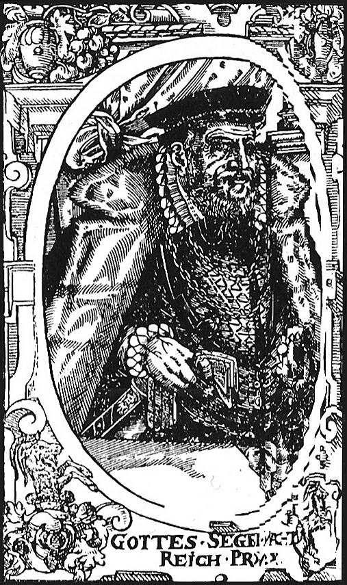 Balthasar Moser von Filseck (Holzstich nach einem Gemälde)